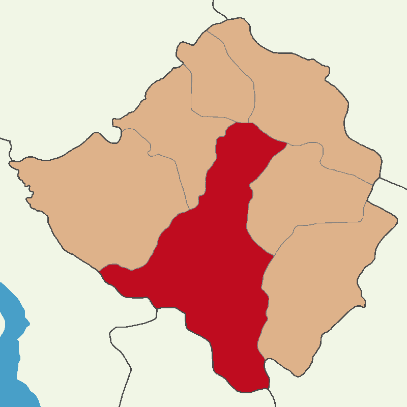 Kırşehir Merkez ilçesinin konumu